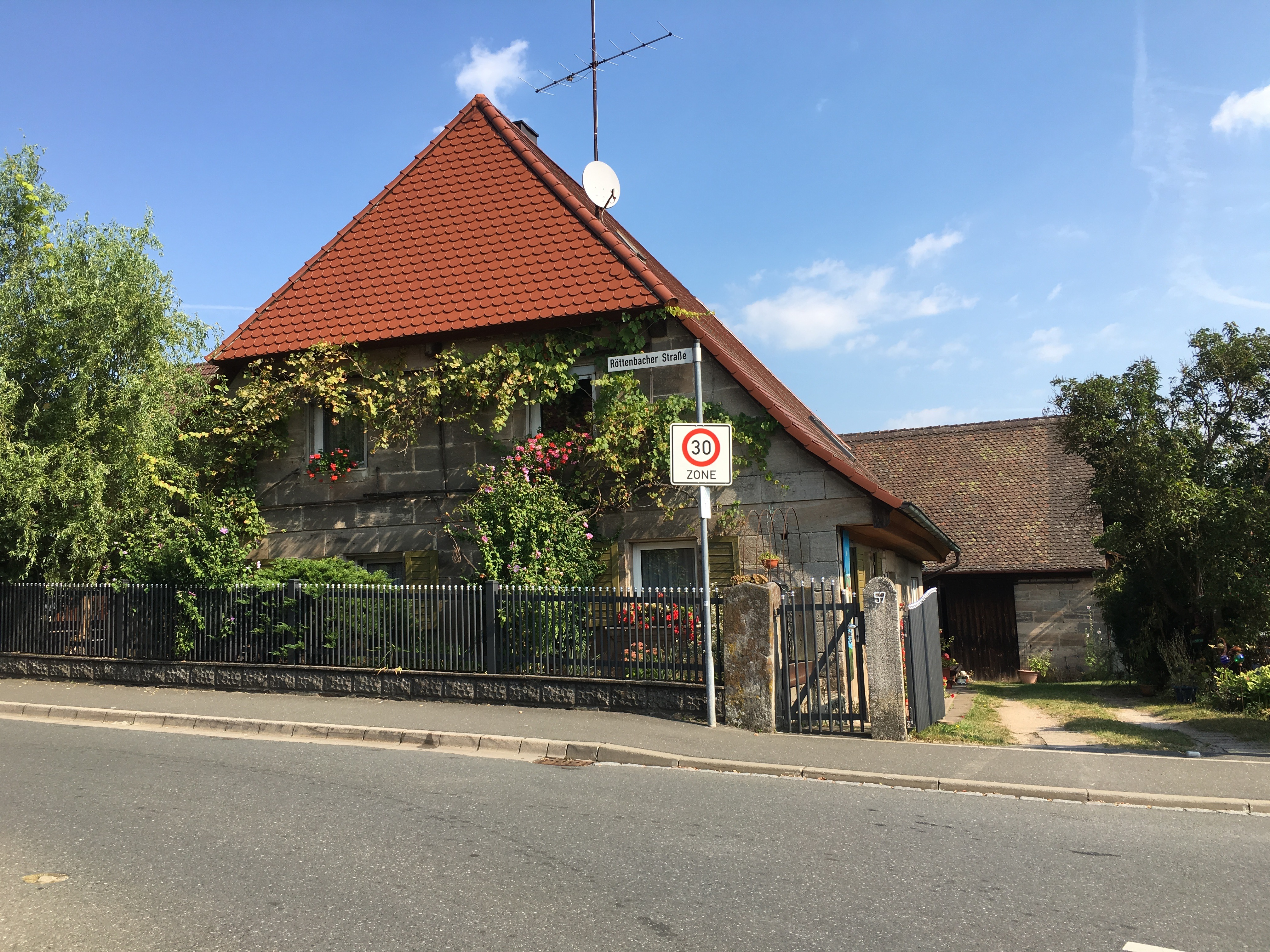 Kleinseebach Kleinseebacher-Straße 57